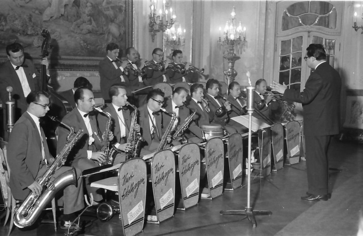 Donaueschingen: Donaueschinger Musiktage; Kurt Edelhagen spielt im Schloss des Fürsten zu Fürstenberg